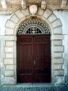 Portale of "Palazzo Palermo" in Grotteria Italy